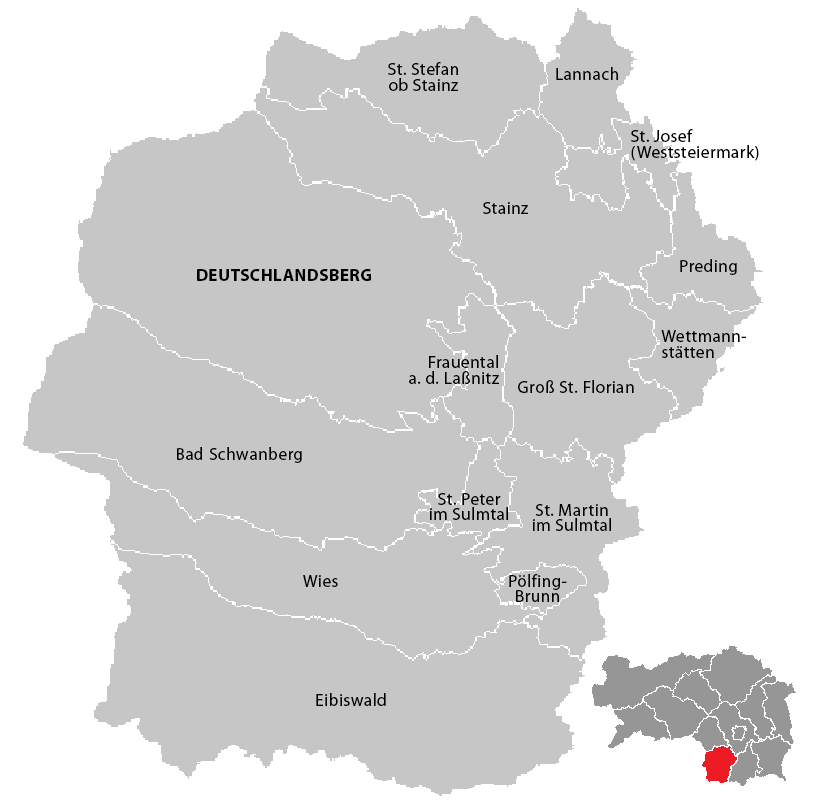 Gemeinden im Bezirk Deutschlandsberg (Steiermark), Stand: 1. Januar 2015